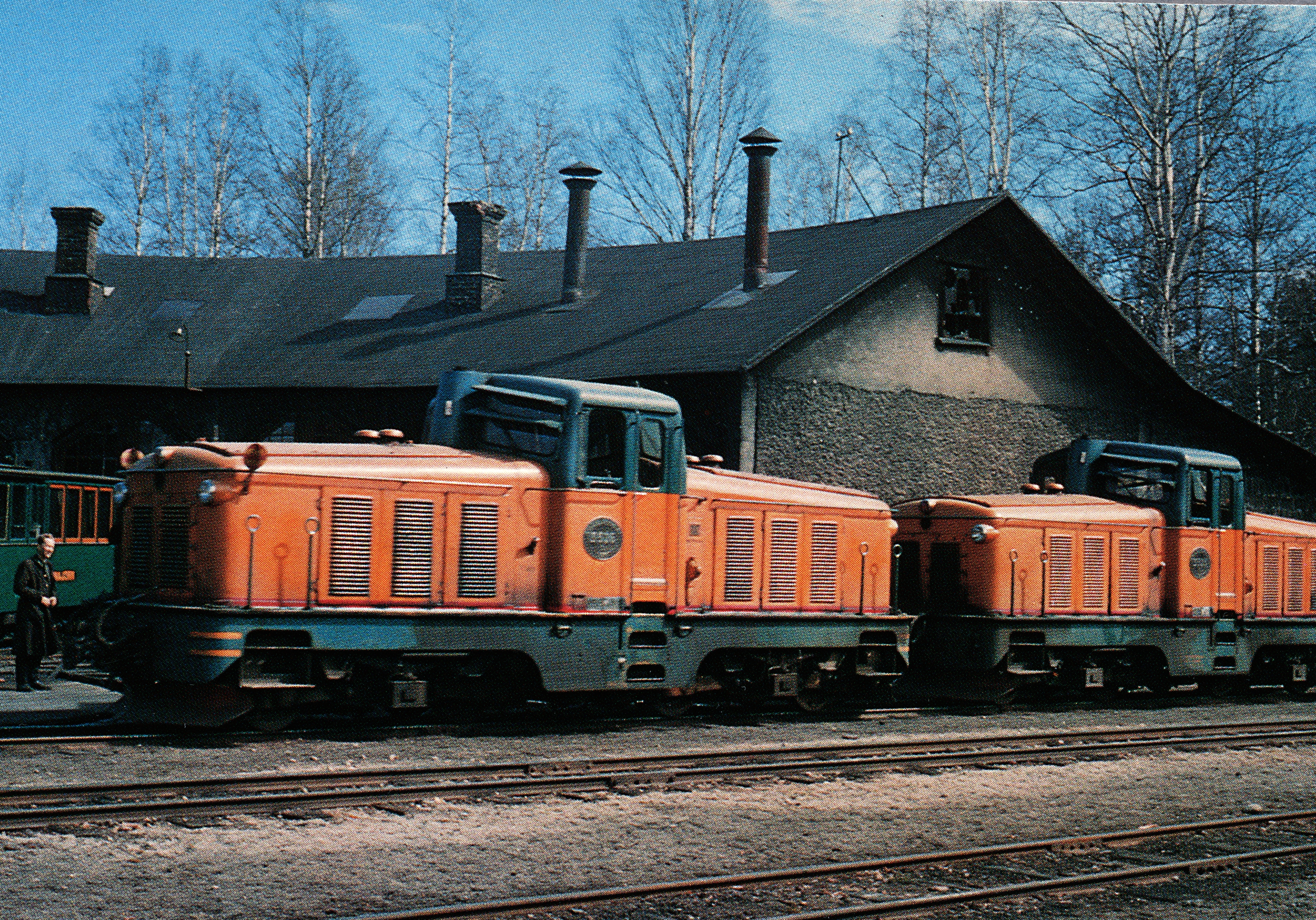 SJ T2p 3525 (f.d. SRJ 5) och SJ T2p 3526 (f.d. SRJ 6) i Jädraås.